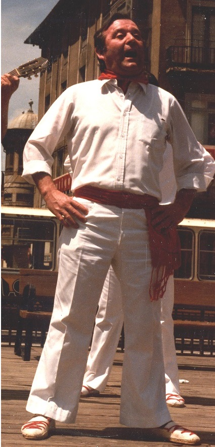 El jotero vianés Julián Arina en Valladolid